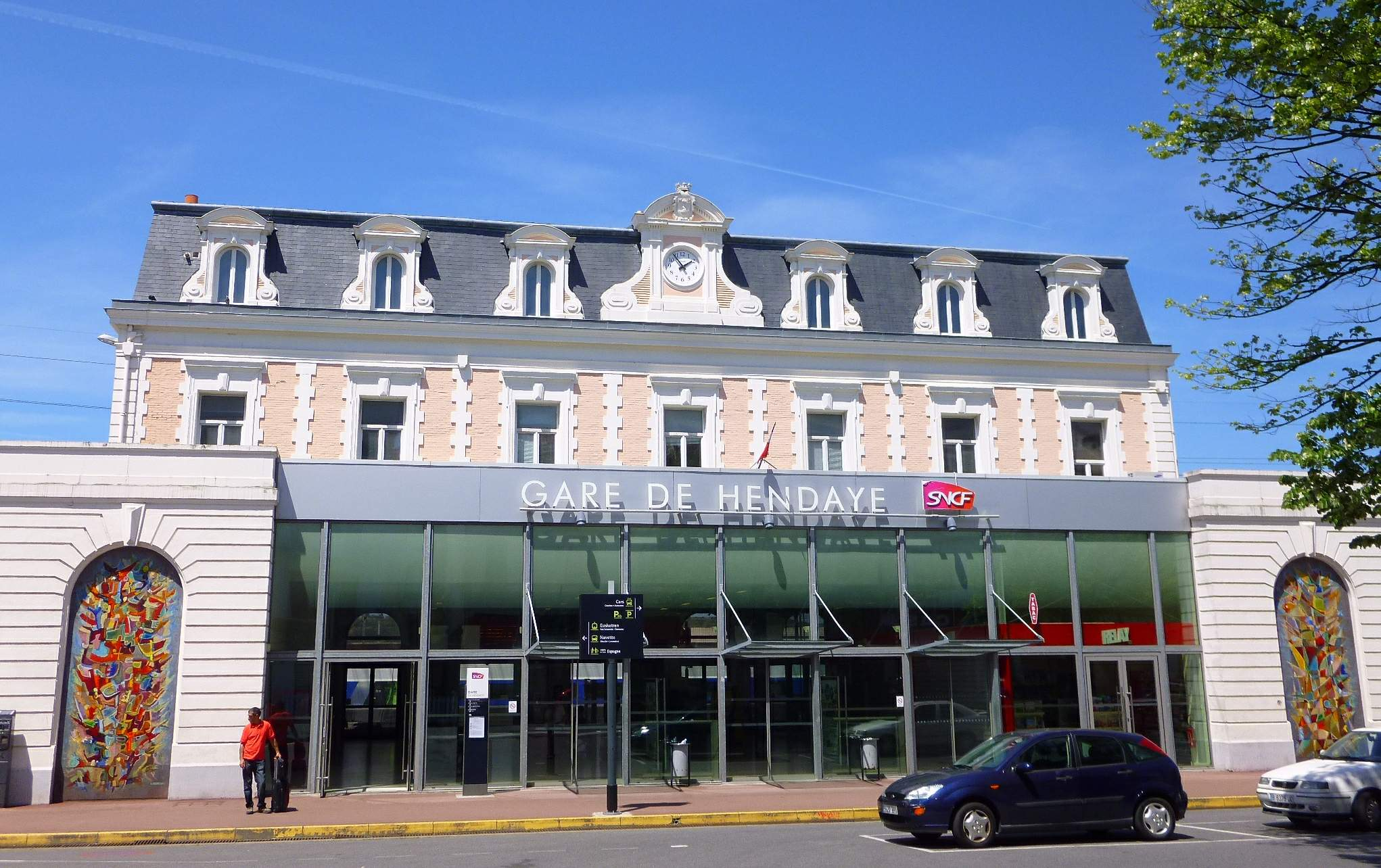 Gare d'Hendaye